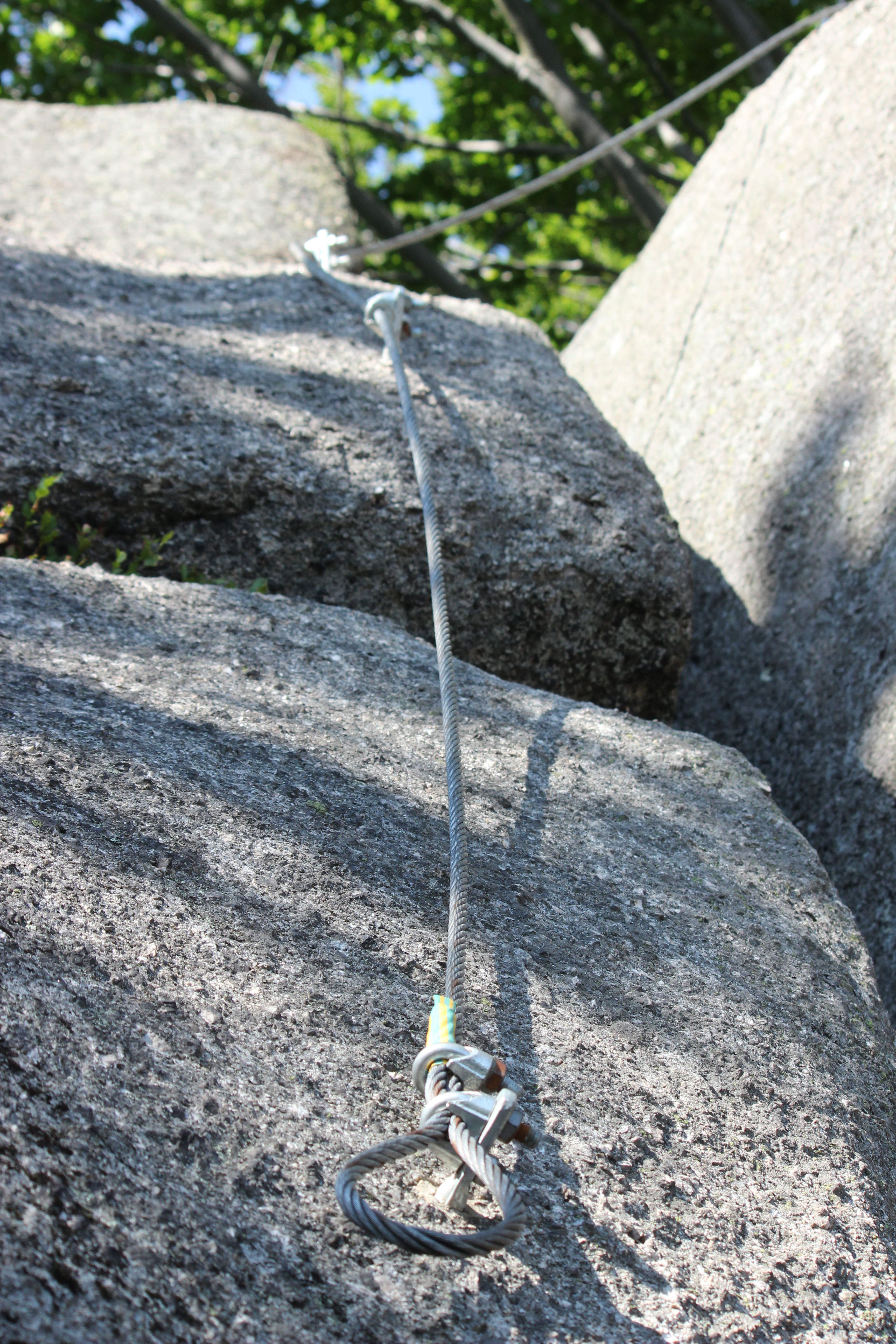 Trasa zajištěné cesty (via ferraty) na Kočičích kamenech v Jizerských horách.